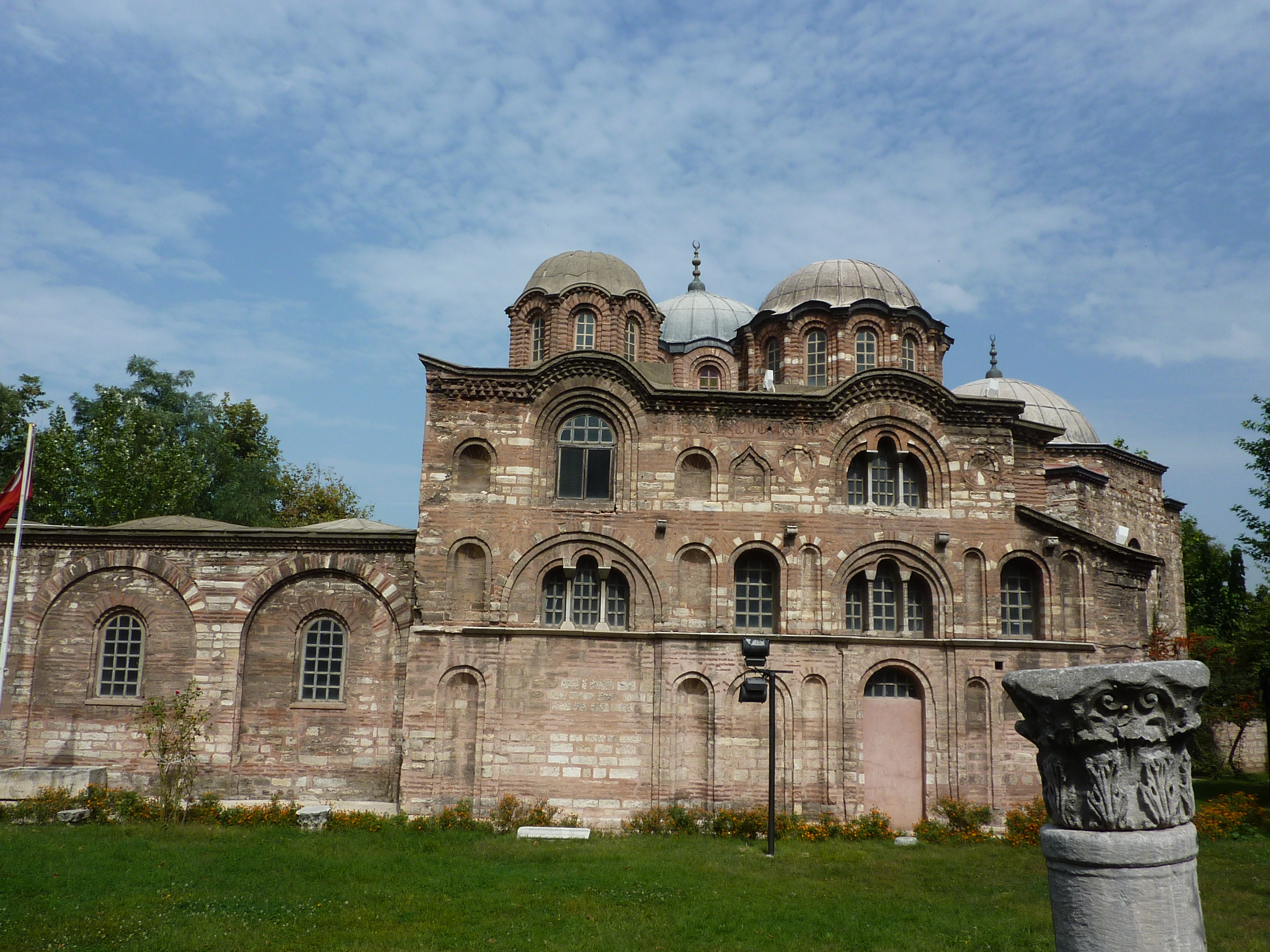 Pammakaristos Church.